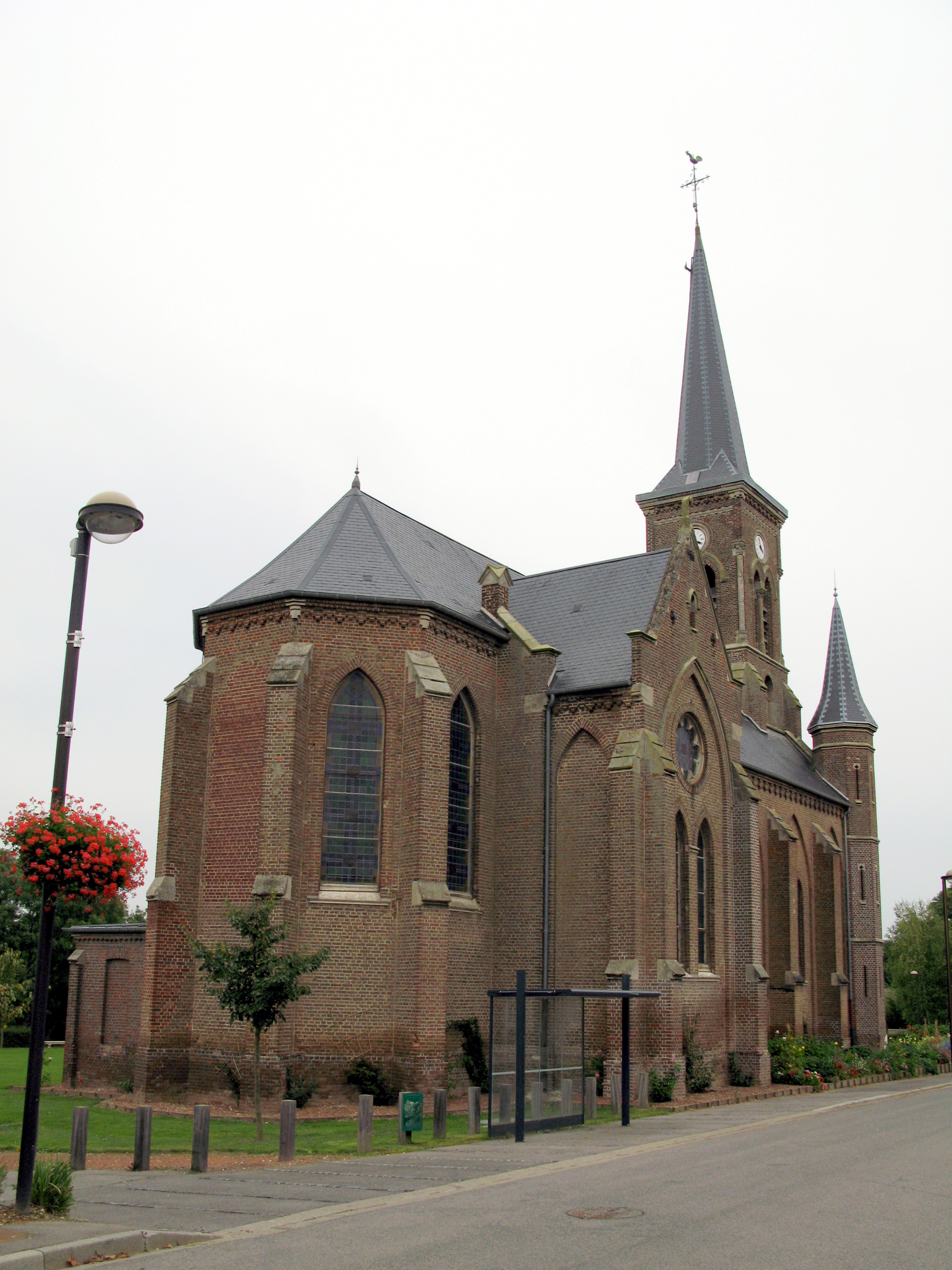 Glisy (Somme, France) - Le chevet de l'église. . . .